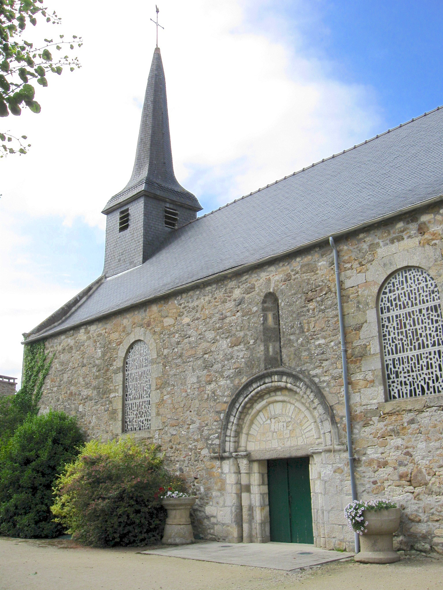 Église Saint-Pierre de Créhen et son portail roman, vestige de l'ancienne église. (département des Côtes-d'Armor, région Bretagne).